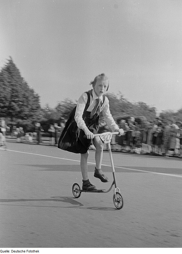 Original image description from the Deutsche Fotothek Mädchen beim Wettkampf